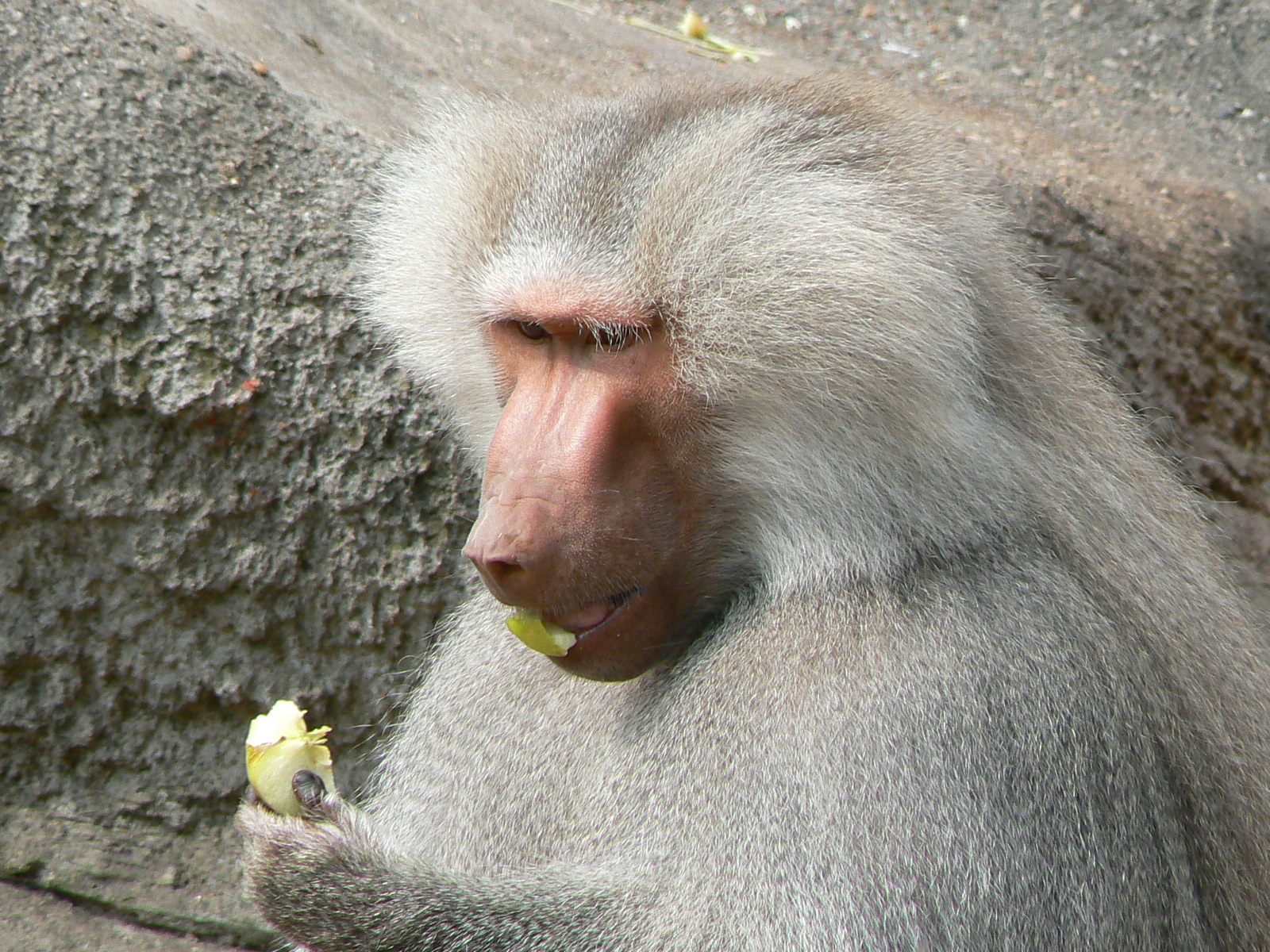 Papio hamadryas / hamadryas baboon / mantelpavian